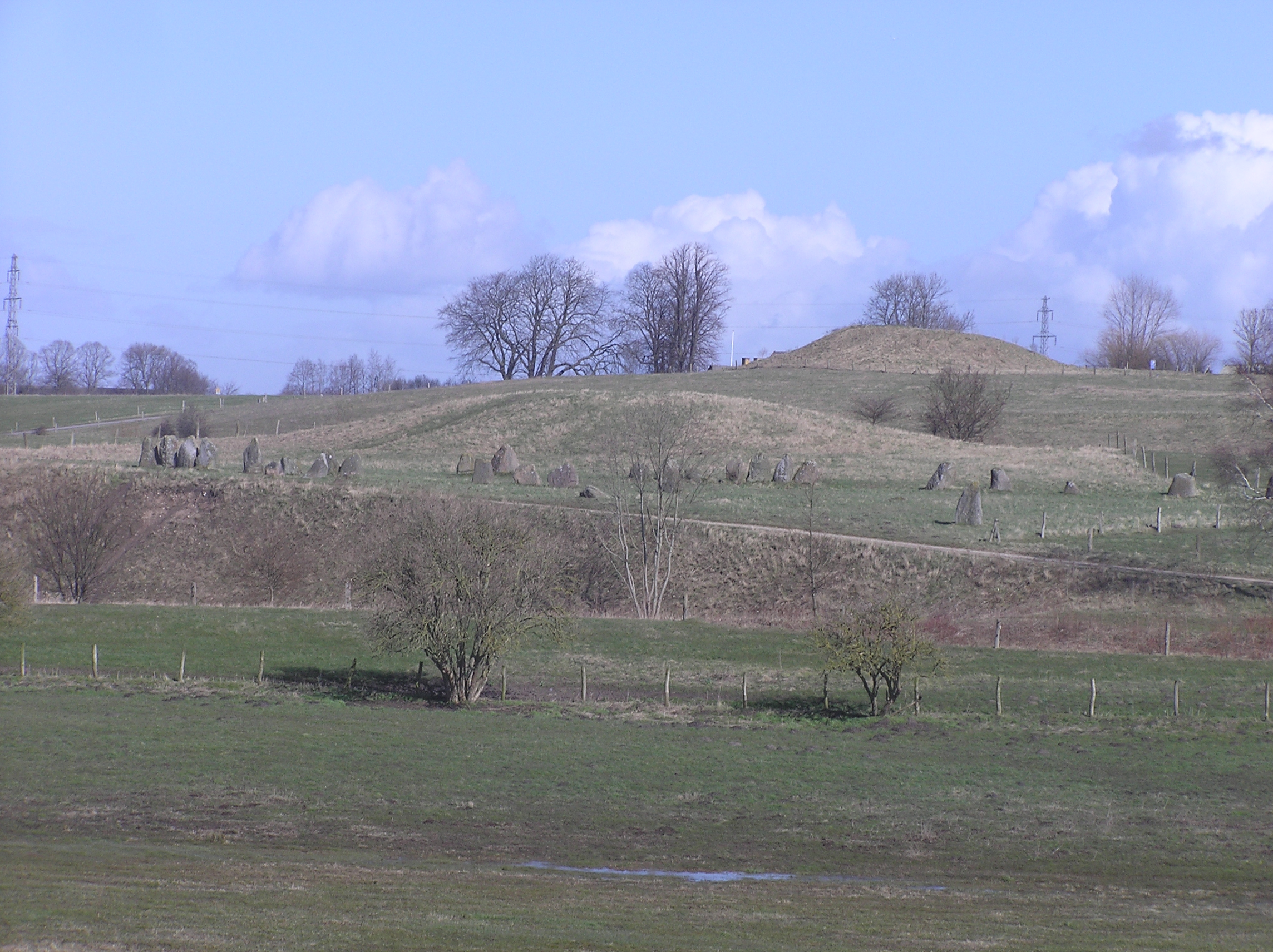 Danmark Sjælland Gammel Lejre:skibssætning